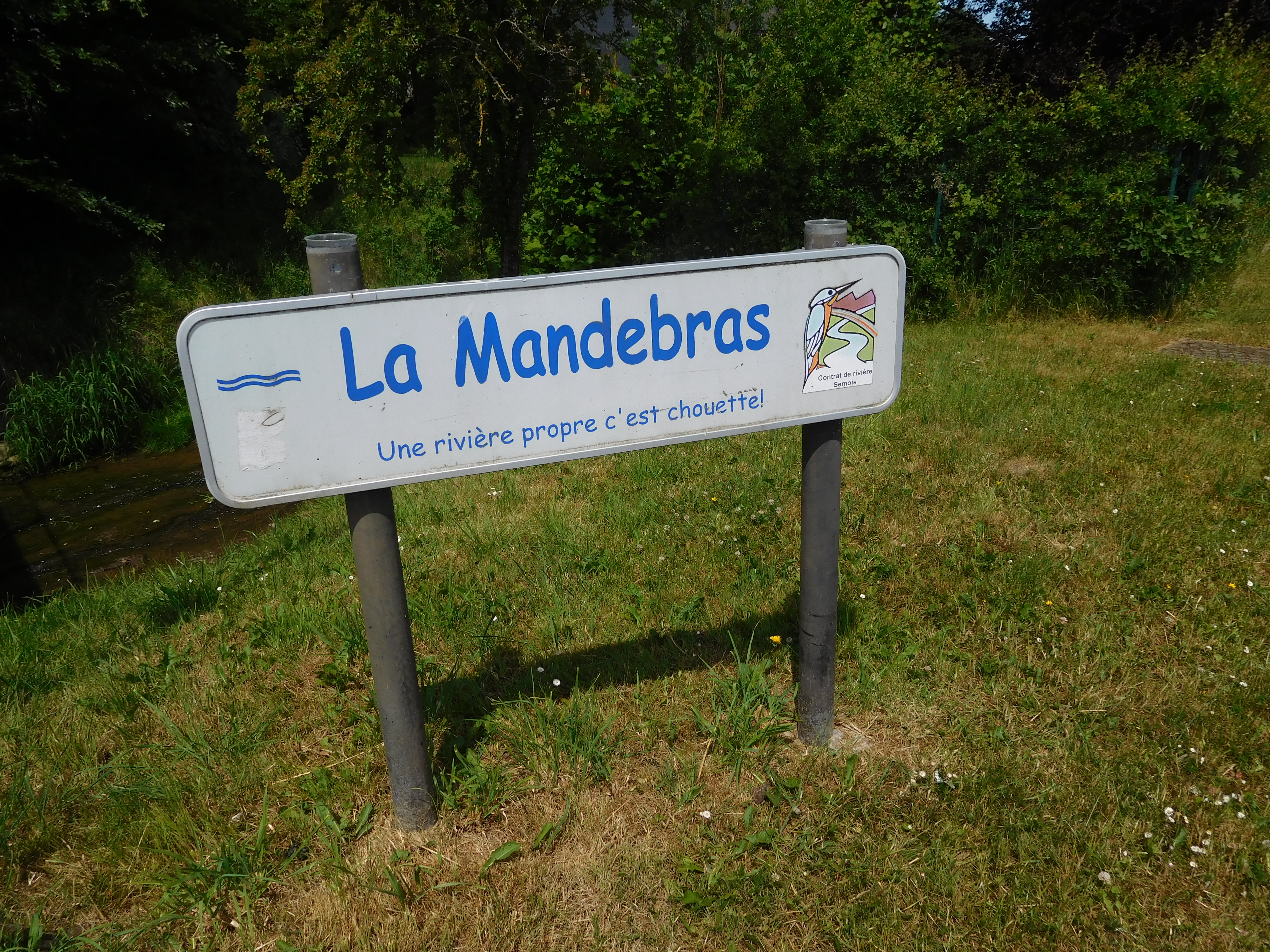 La Mandebras est une rivière de l'Ardenne belge se jetant dans la Rulles, à Rulles (Belgique)